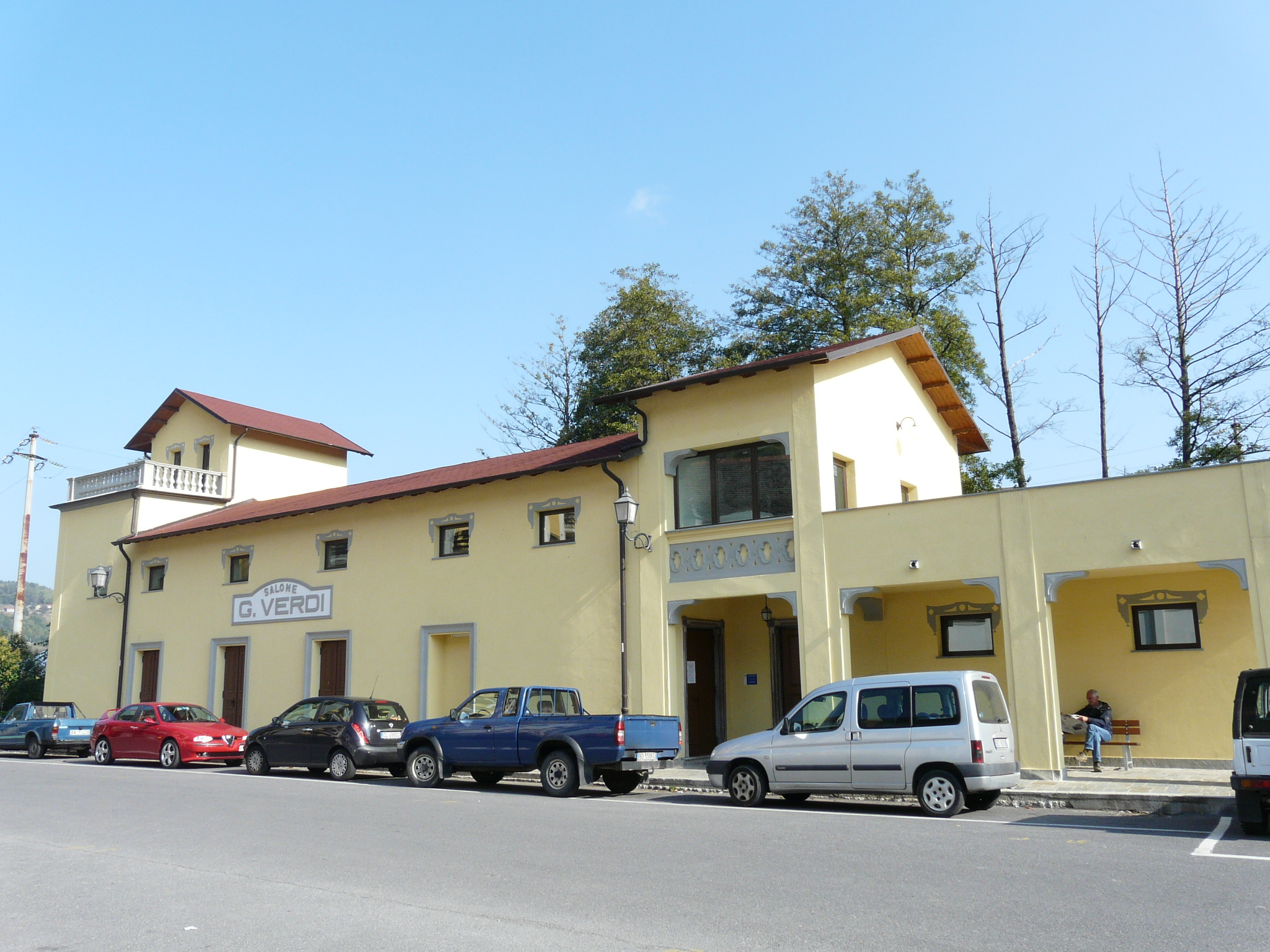 Salone Giuseppe Verdi, Calizzano, Liguria, Italia